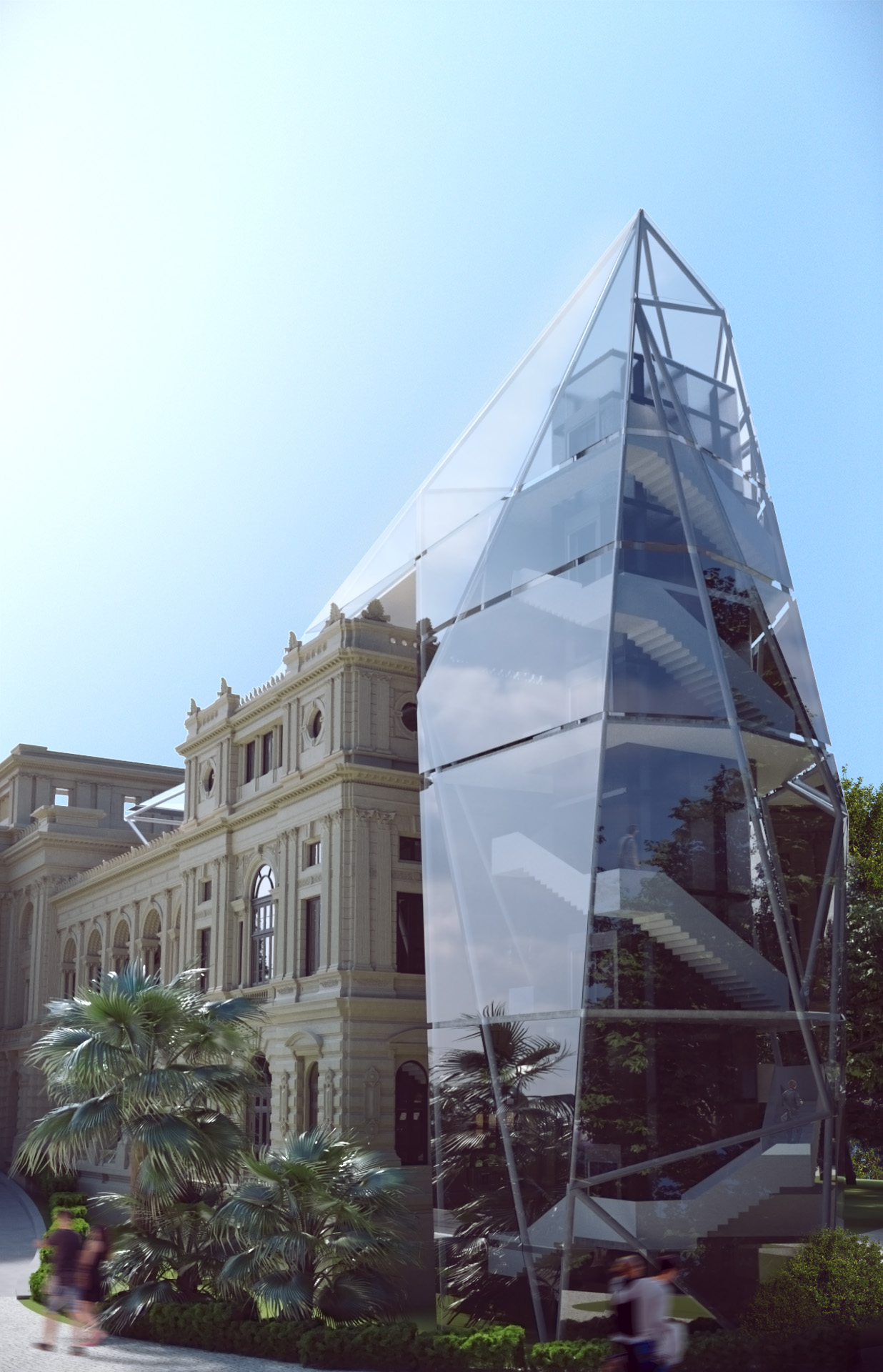 Image réalisé dans le cadre du concours de restauration et d'extension du Museu do Ipiranga - 2017 - projet proposé par le bureau d'architecture ARCHICAZ